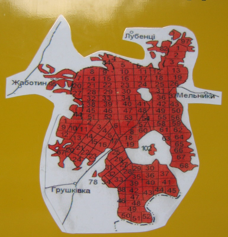 Схема Холодного Яра.